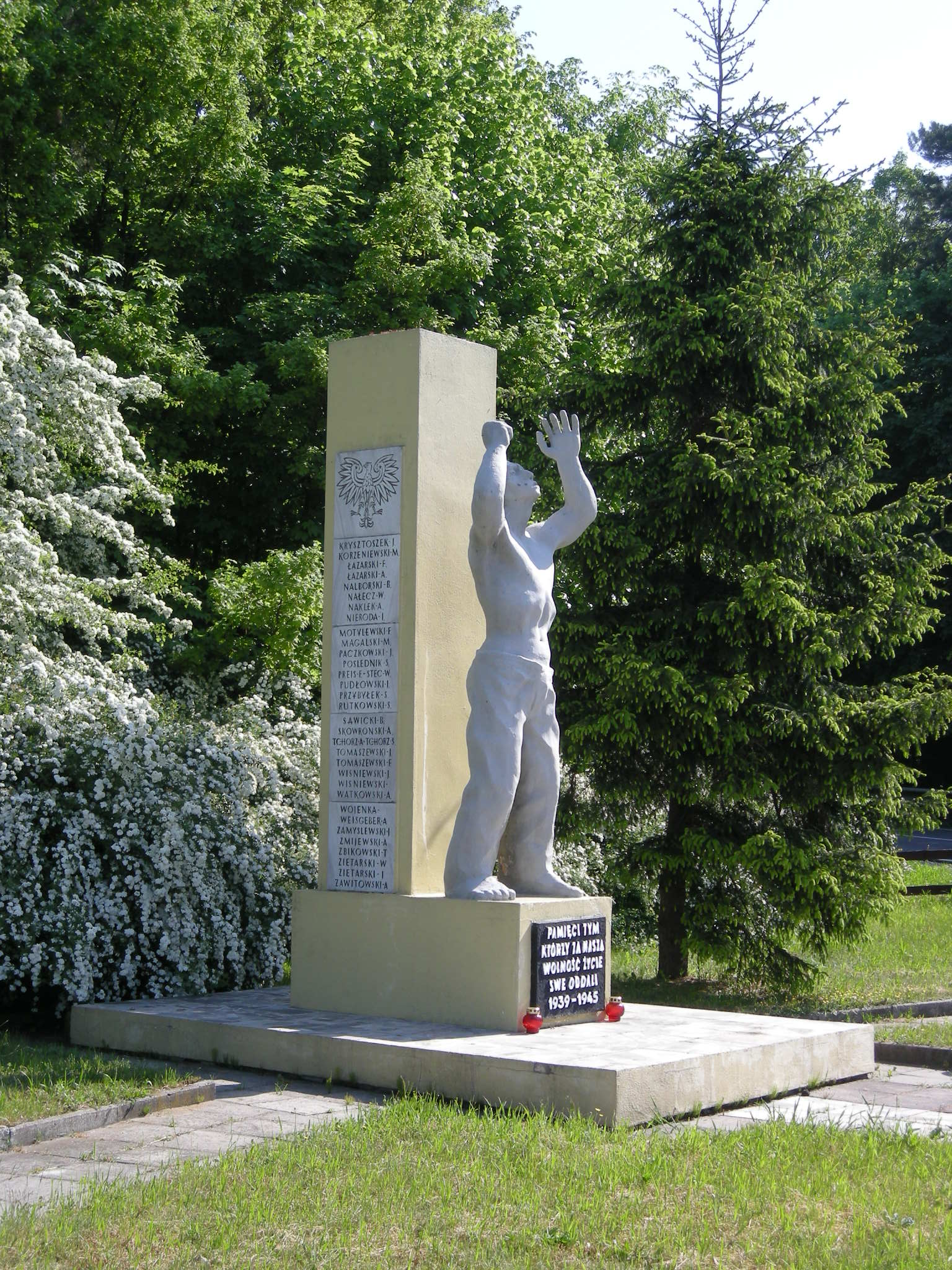 Pomnik upamiętniający pomordowanych w latach 1939-1945 mieszkańców wsi Mokre, woj. kujawsko-pomorskie, pow. grudziądzki.